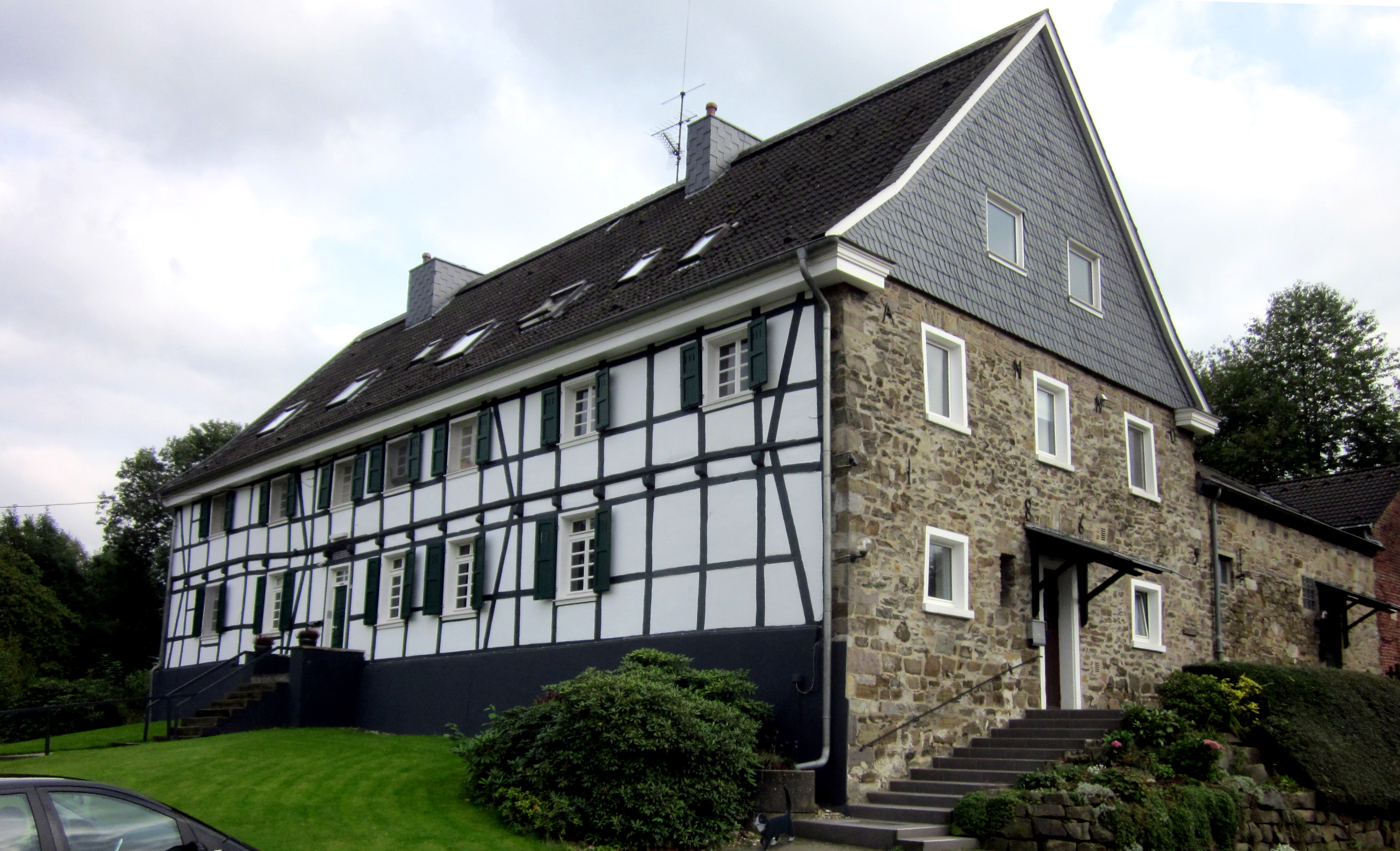 Der Abtskücher Hof wird als Teil des ehemaligen „Schlosses“ vermutet This is a photograph of an architectural monument.